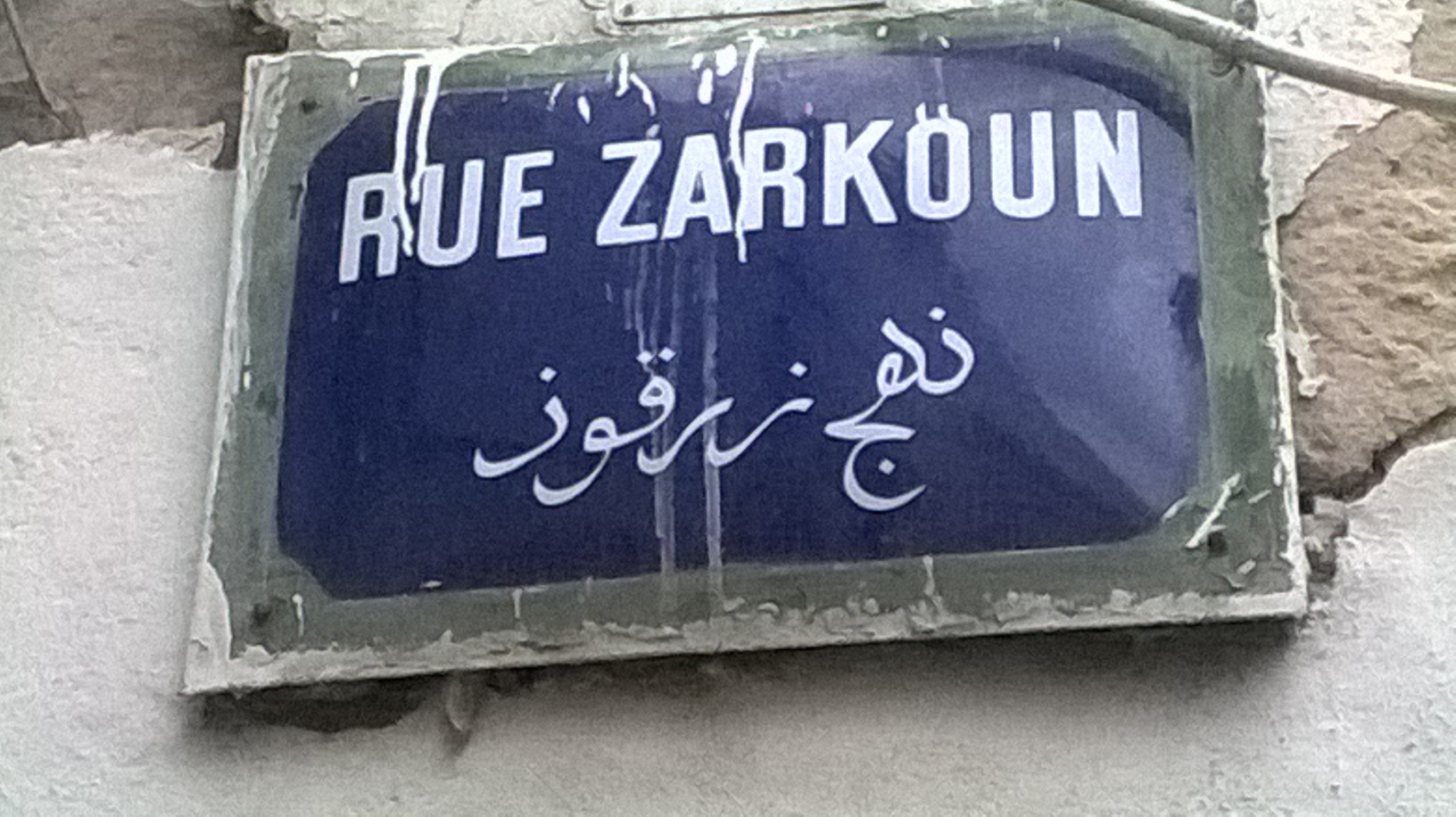 La médina de Tunis مدينة تونس العتيقة